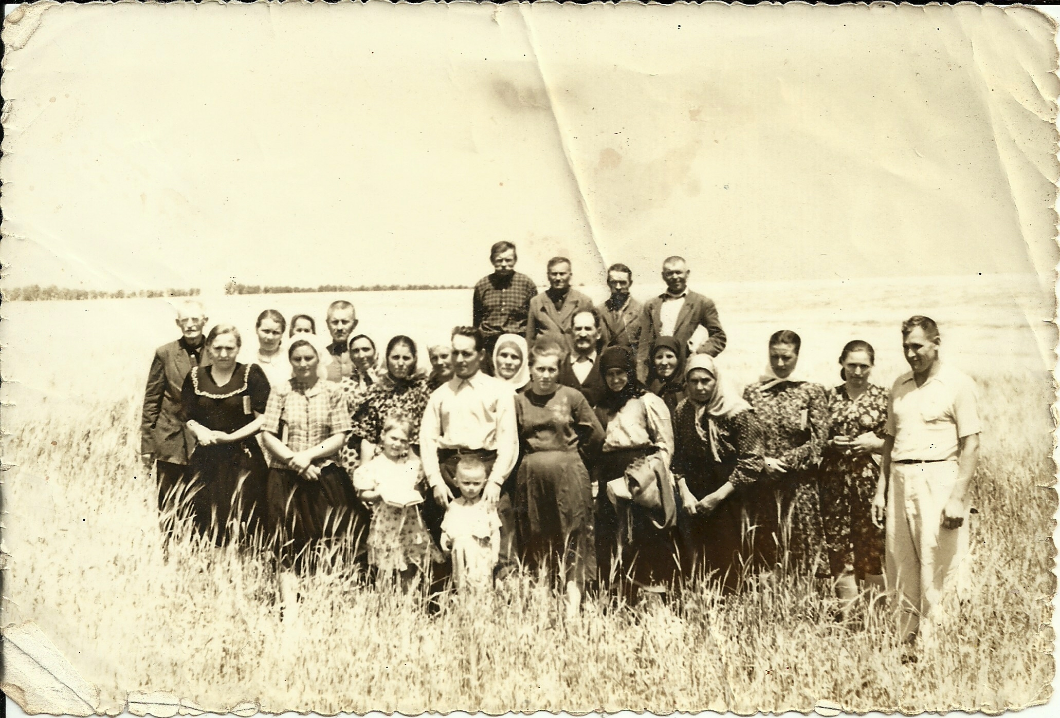 Церква євенгельських християн баптистів у Косовці, Білгород-Дністровський район Одеської області